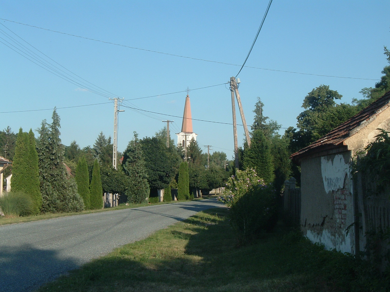 Sajtoskál, Hungary